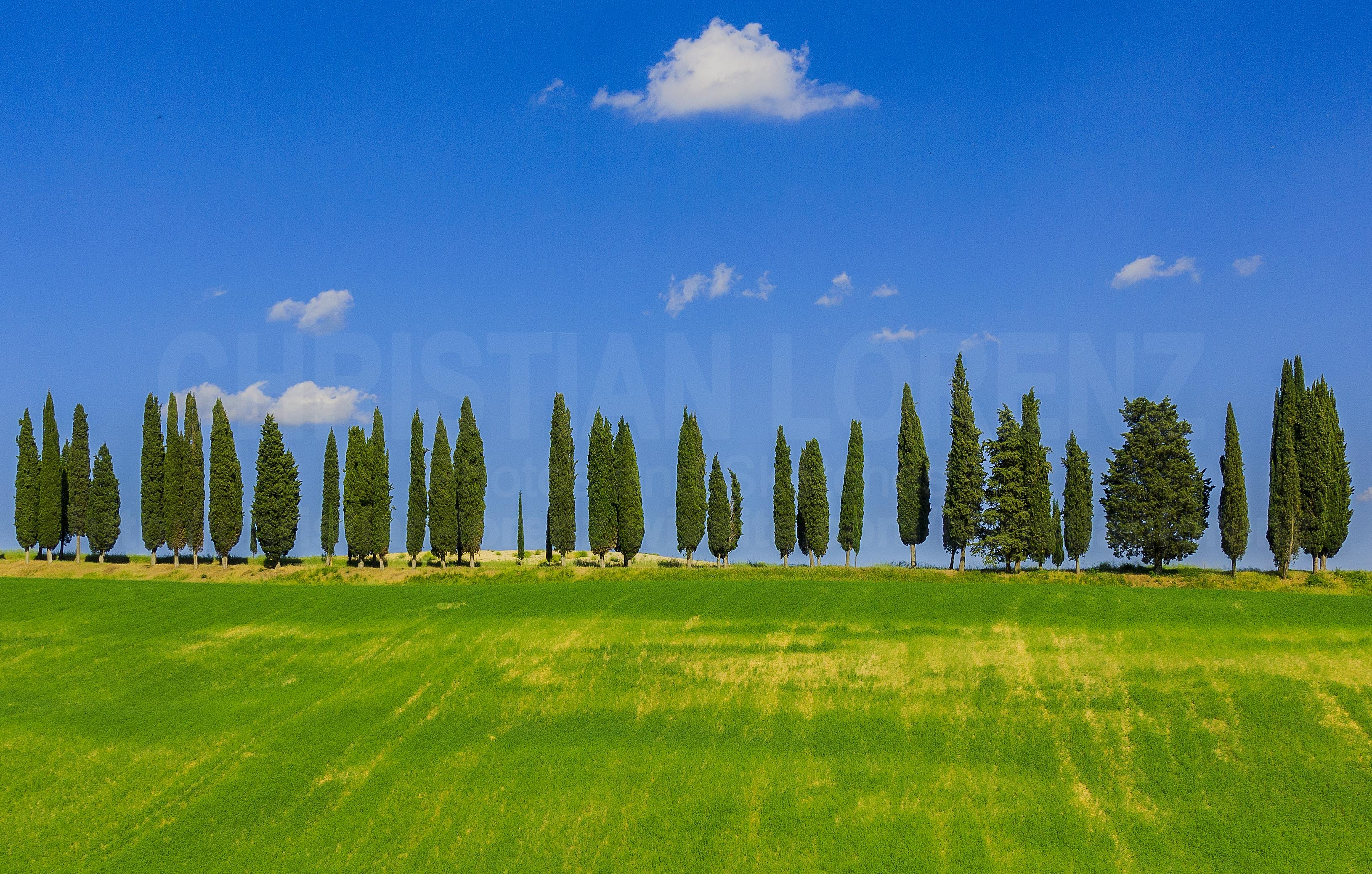 Cipressi nei dintorni di Galliano, Barberino di Mugello.